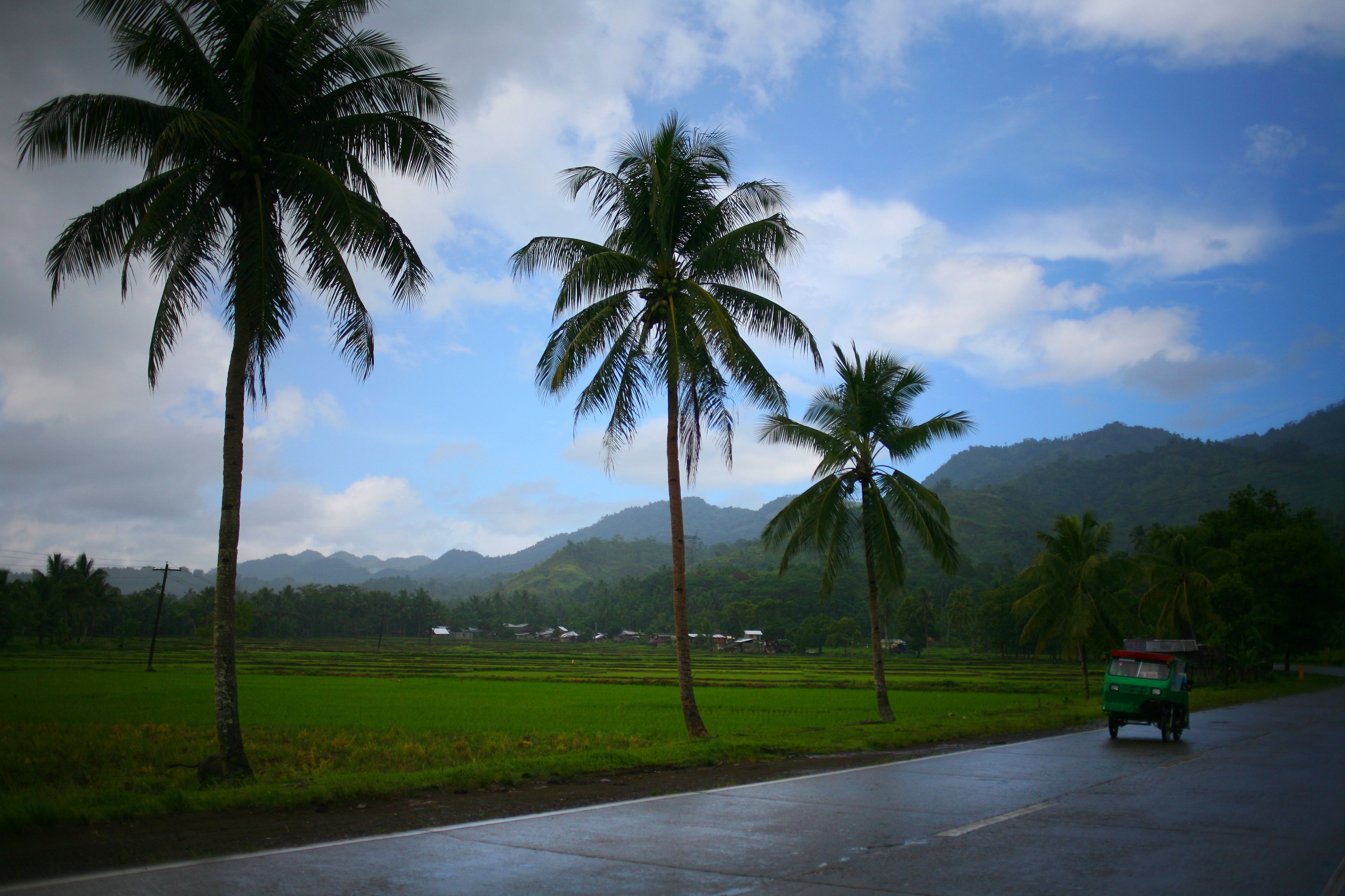 Tubay, Agusan del Norte, Mindanao, Filippine